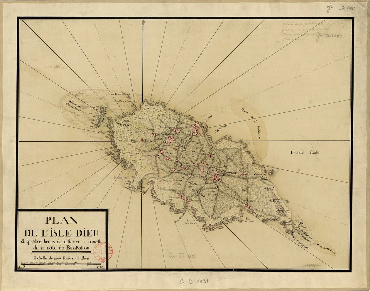 Plan de l'ile Dieu avant la Révolution, en 1788. Elle était alors orthographiée "Île Dieu"